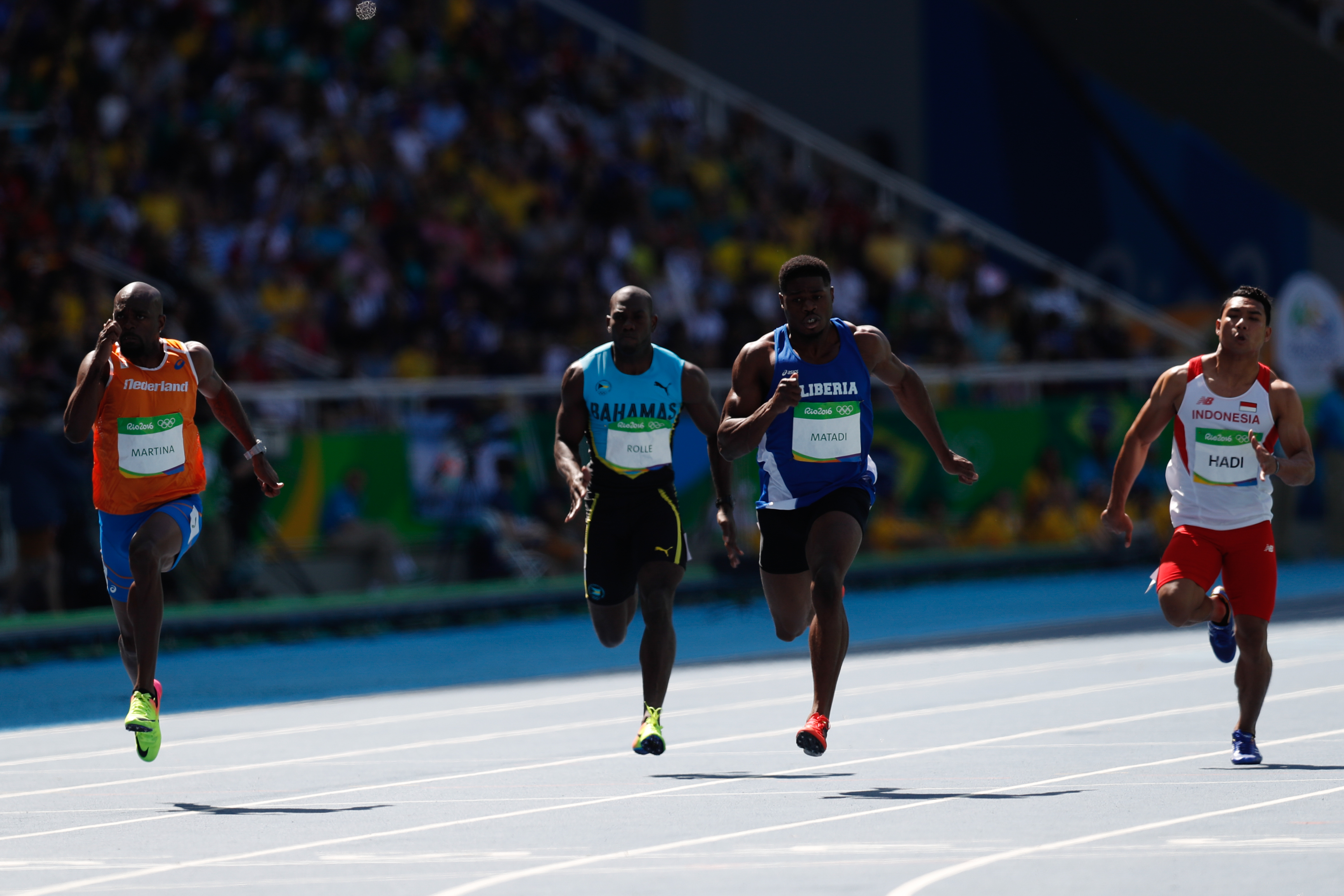 Men's 100 m sprint heats